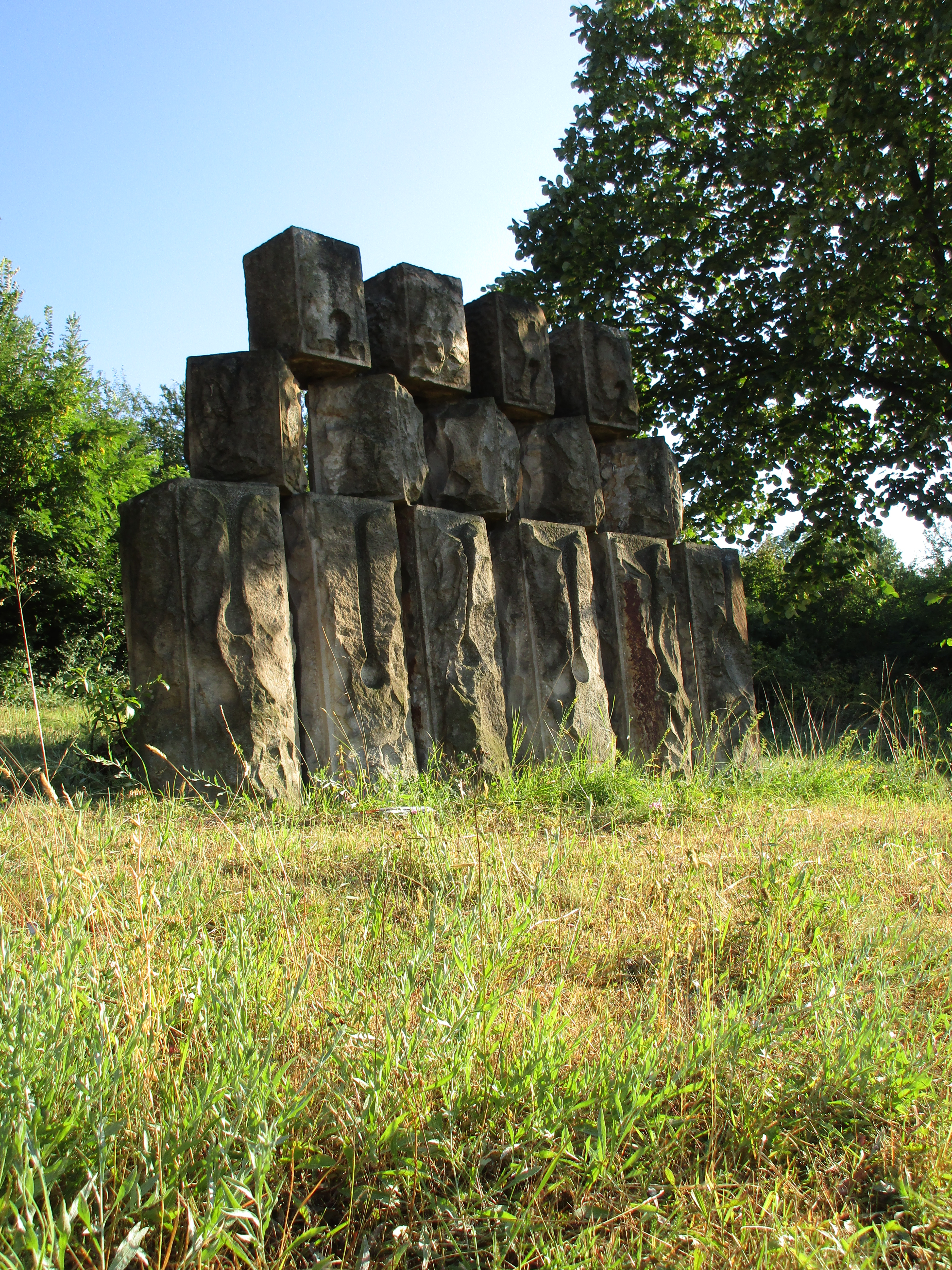 Srpski (latinica): Arapova dolina